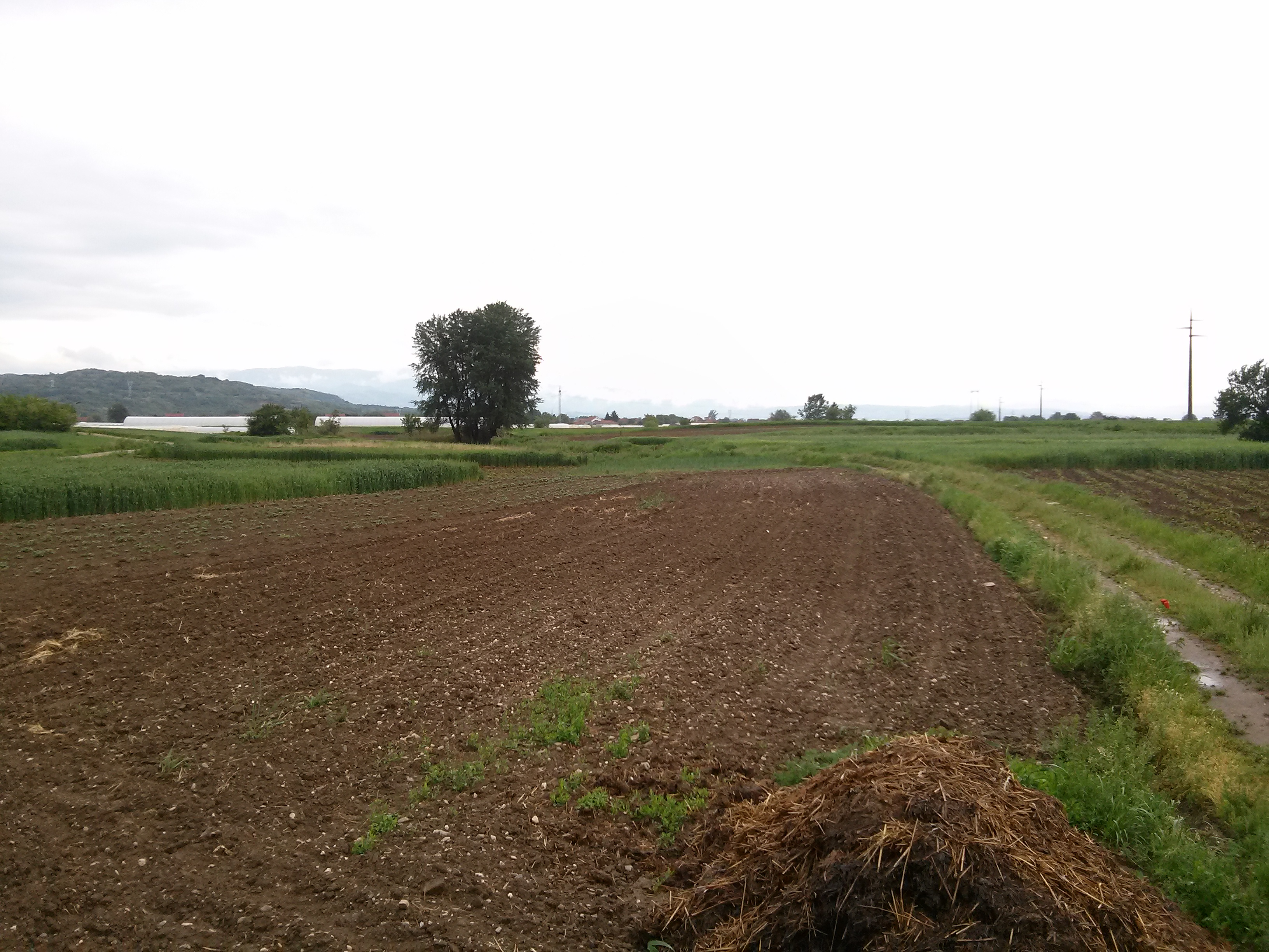 Српски (ћирилица): Lokalitet Crni Vir u Kumarevu, nekada izvor, danas obradive površine